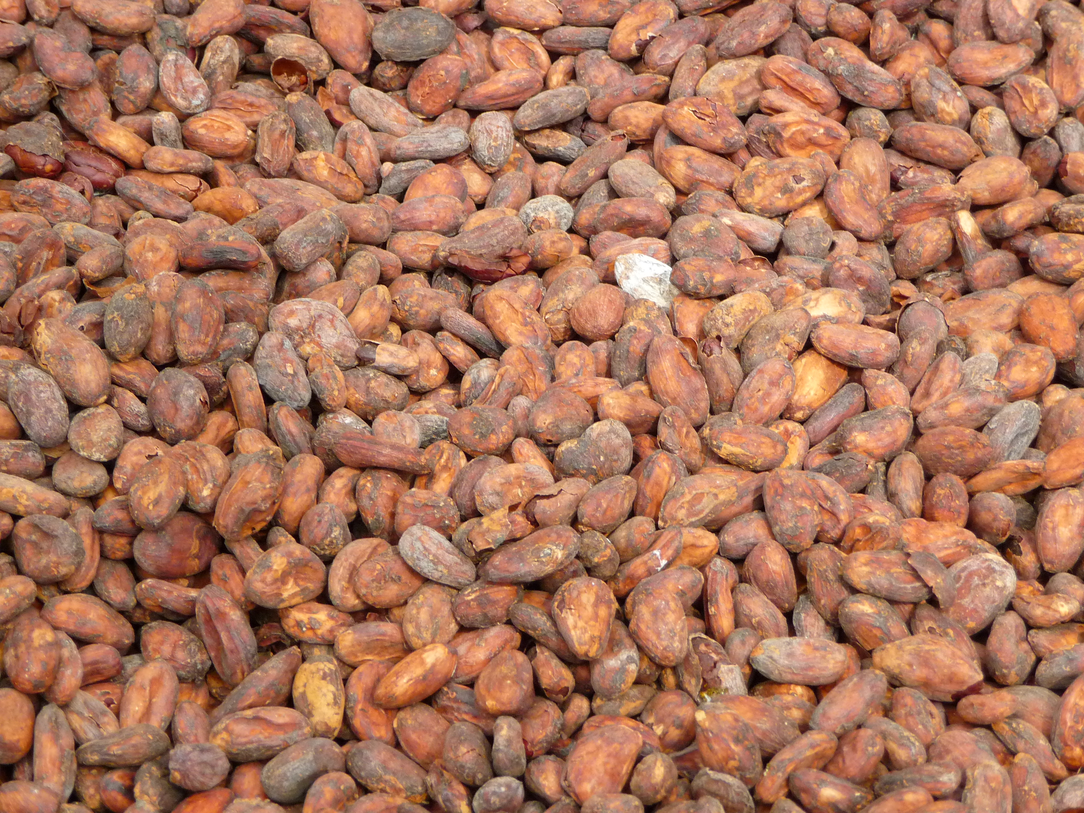 Kakaobohnen